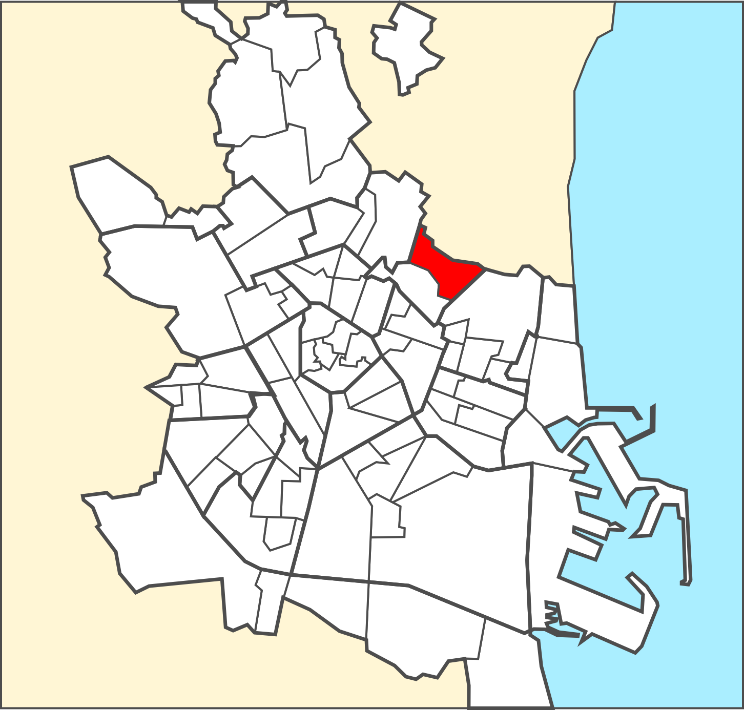 Localització del barri dins de la ciutat de València.